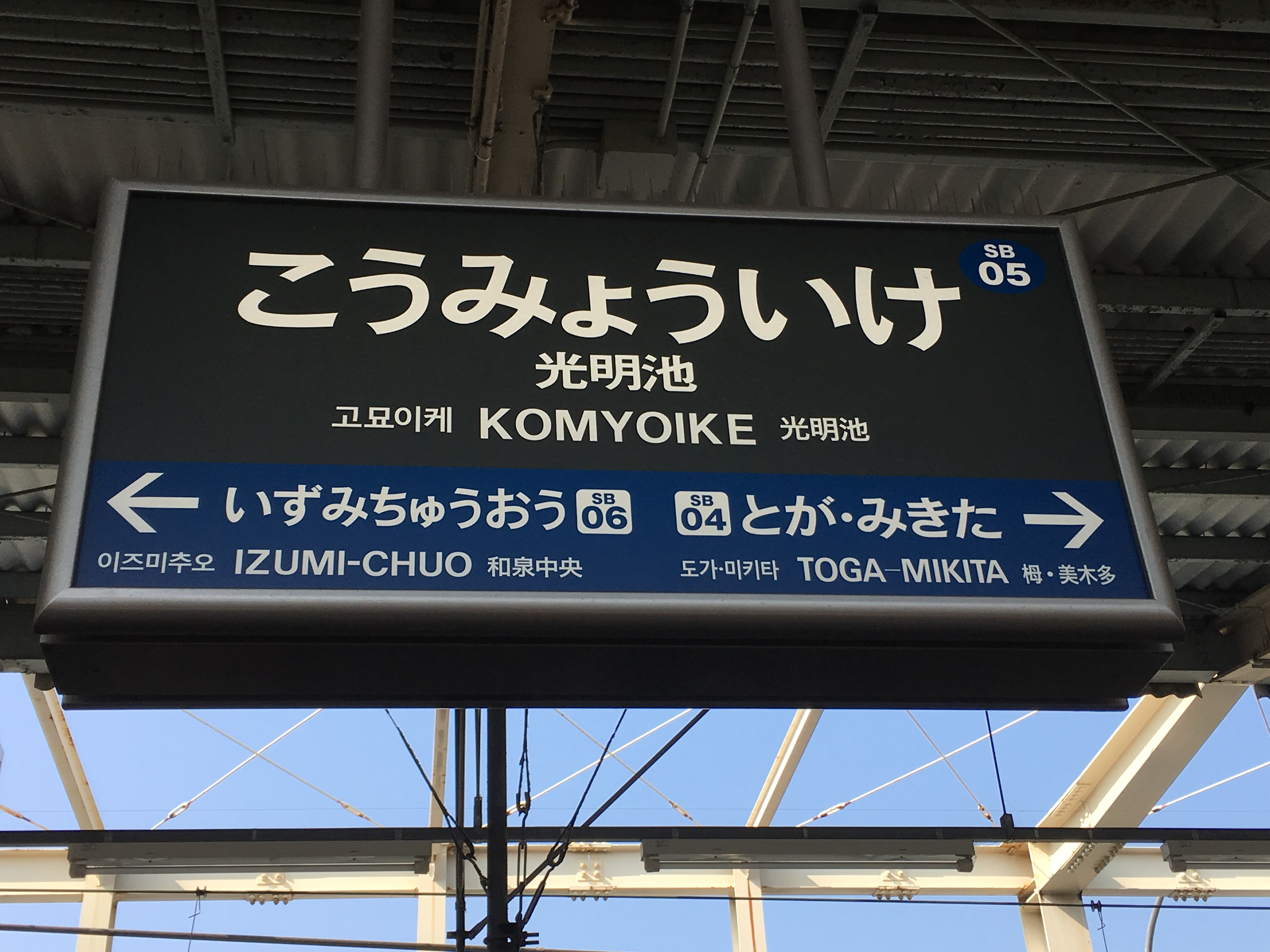 駅ナンバリングが入った泉北高速鉄道光明池駅の駅名標